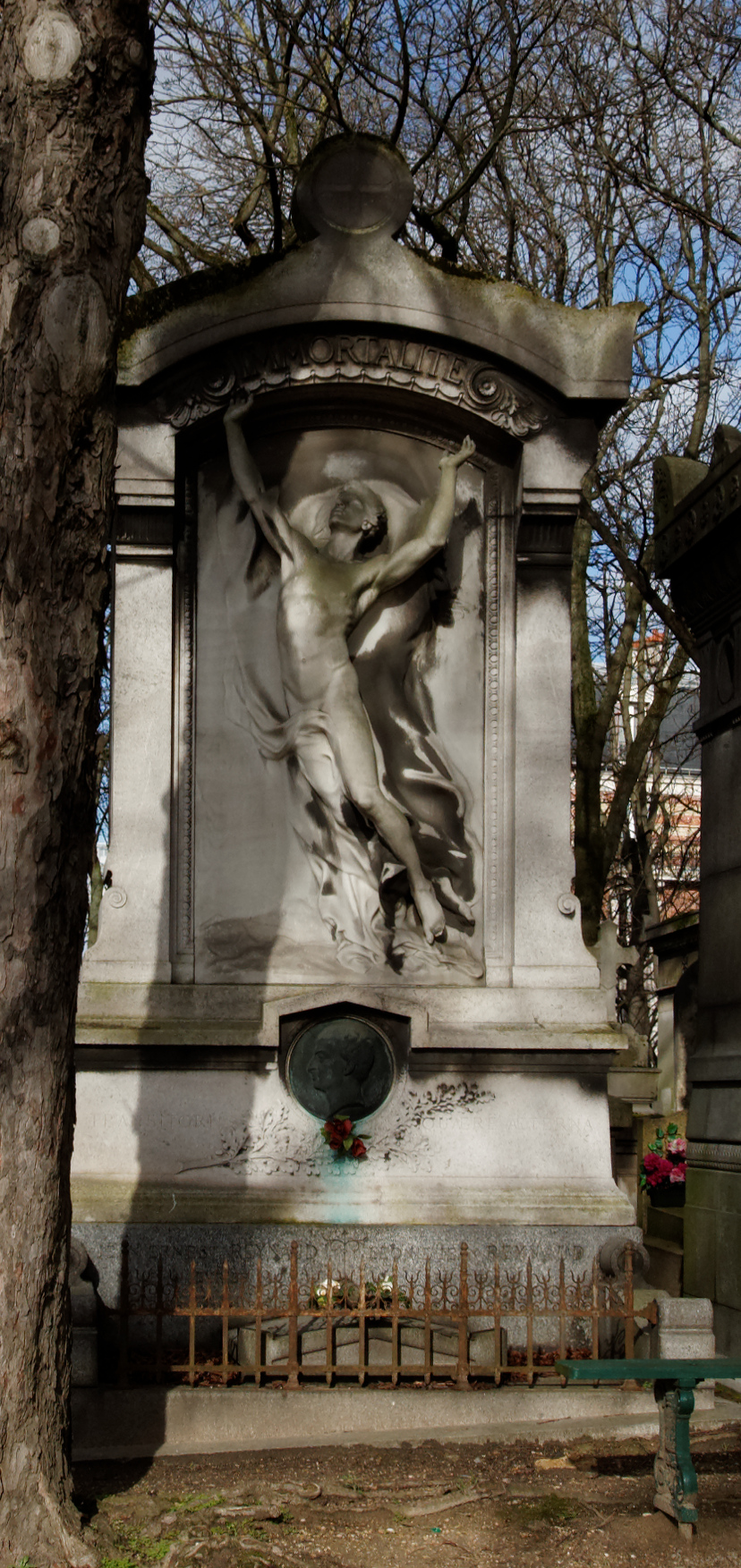 Statue Immortalité par Henri Chapu et médaillon en bronze par David d'Angers.